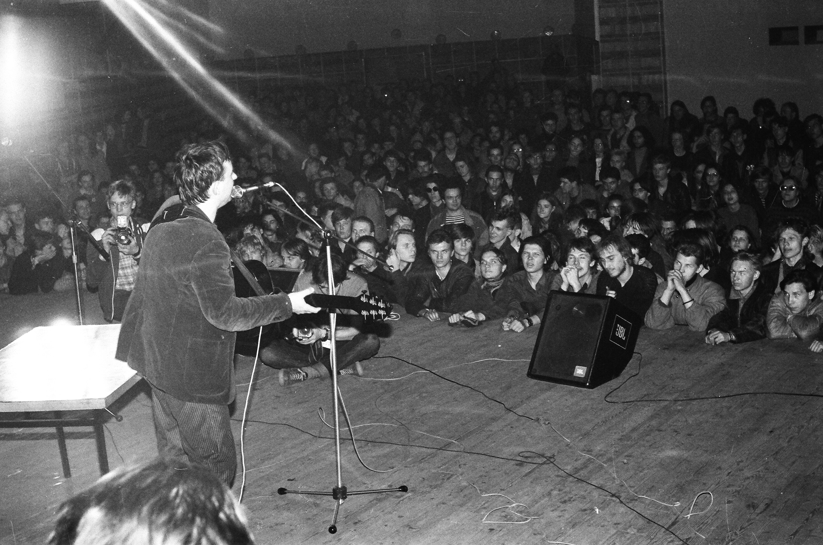 Instruktsiya po Vizhivaniyu Induki 1991